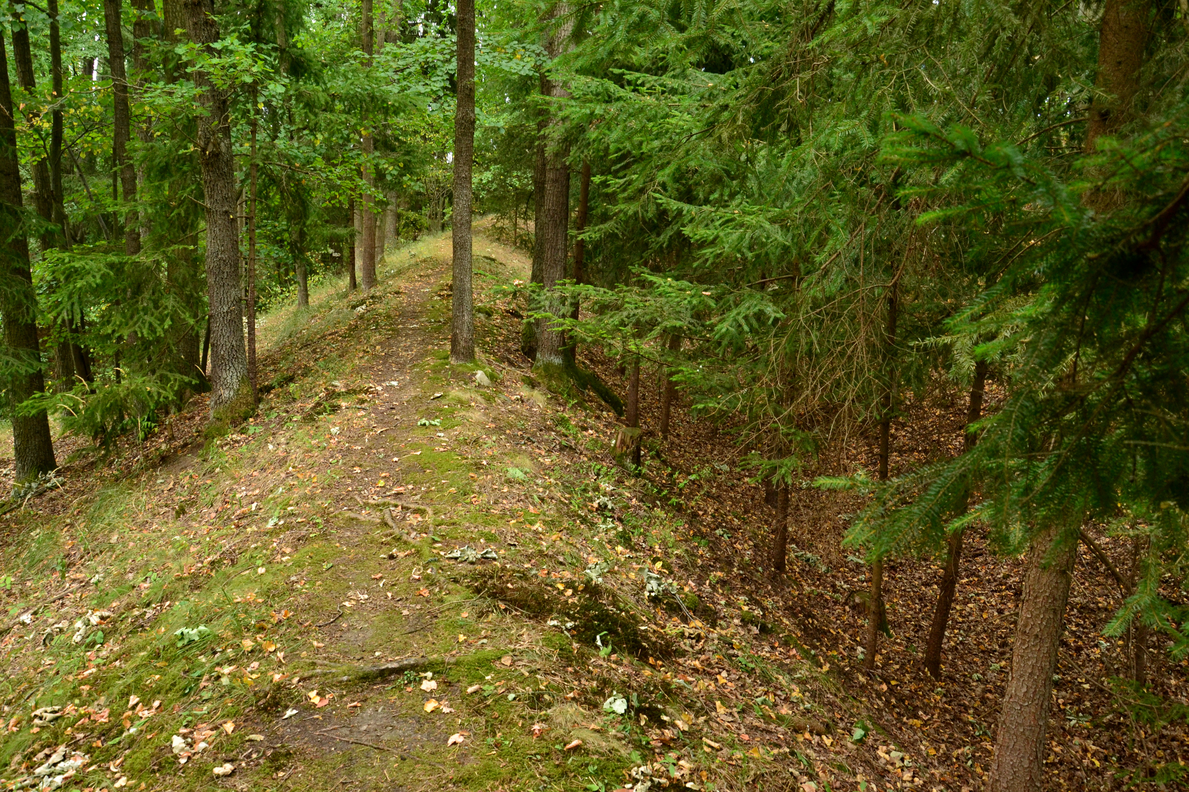 Val na západní straně